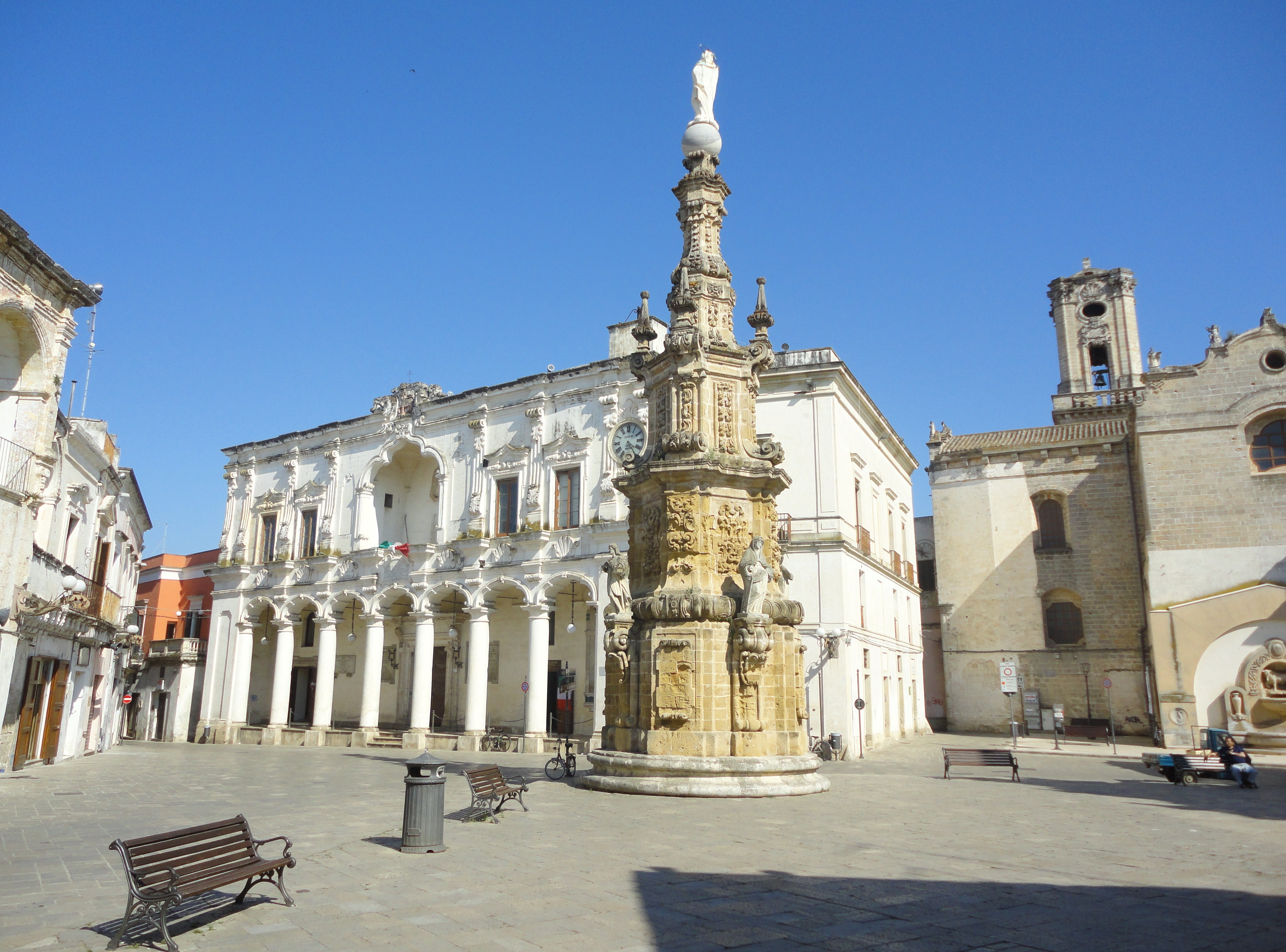 Piazza Salandra di Nardò, Lecce